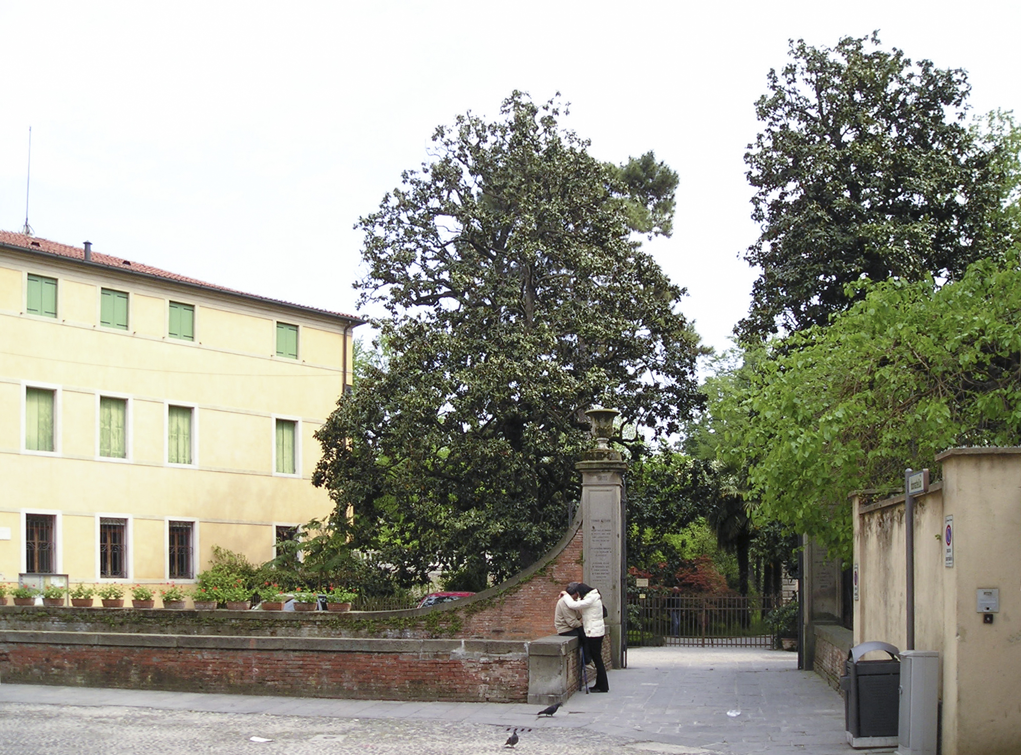 Vèneto: L'ingreso del parco.